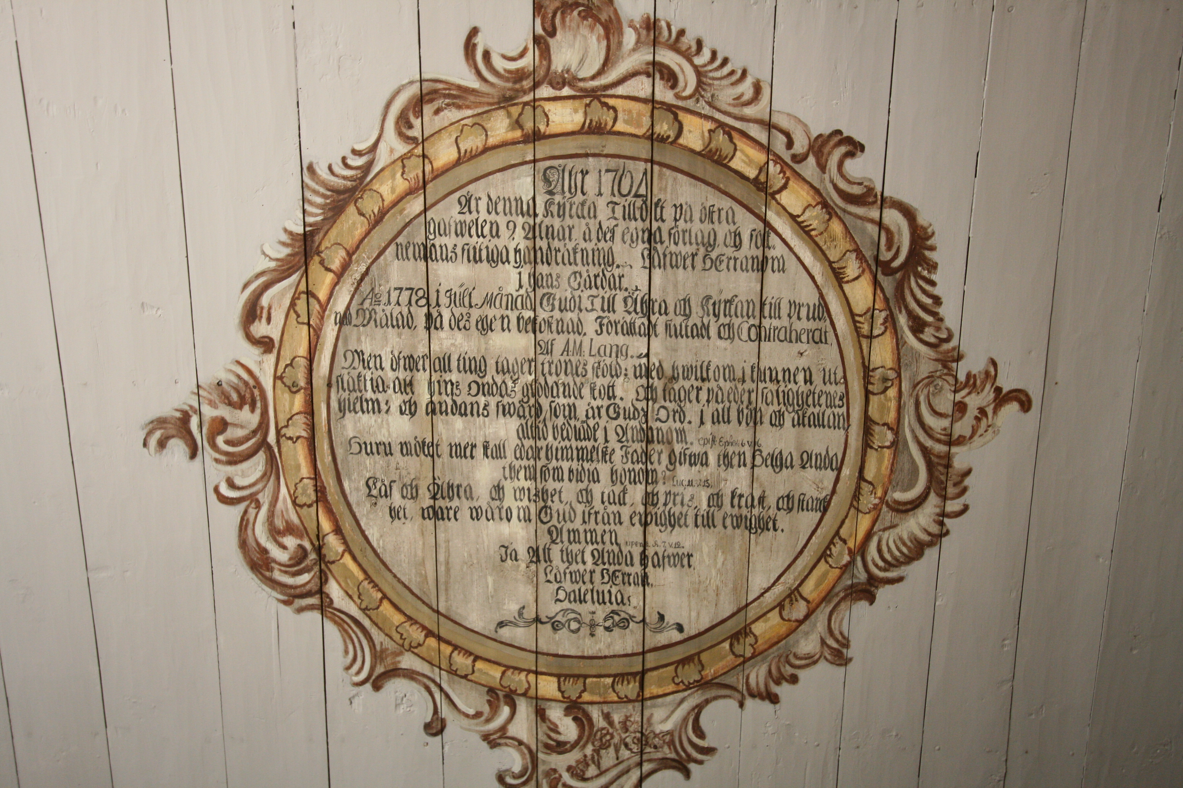 Takmålning i Vesene kyrka.